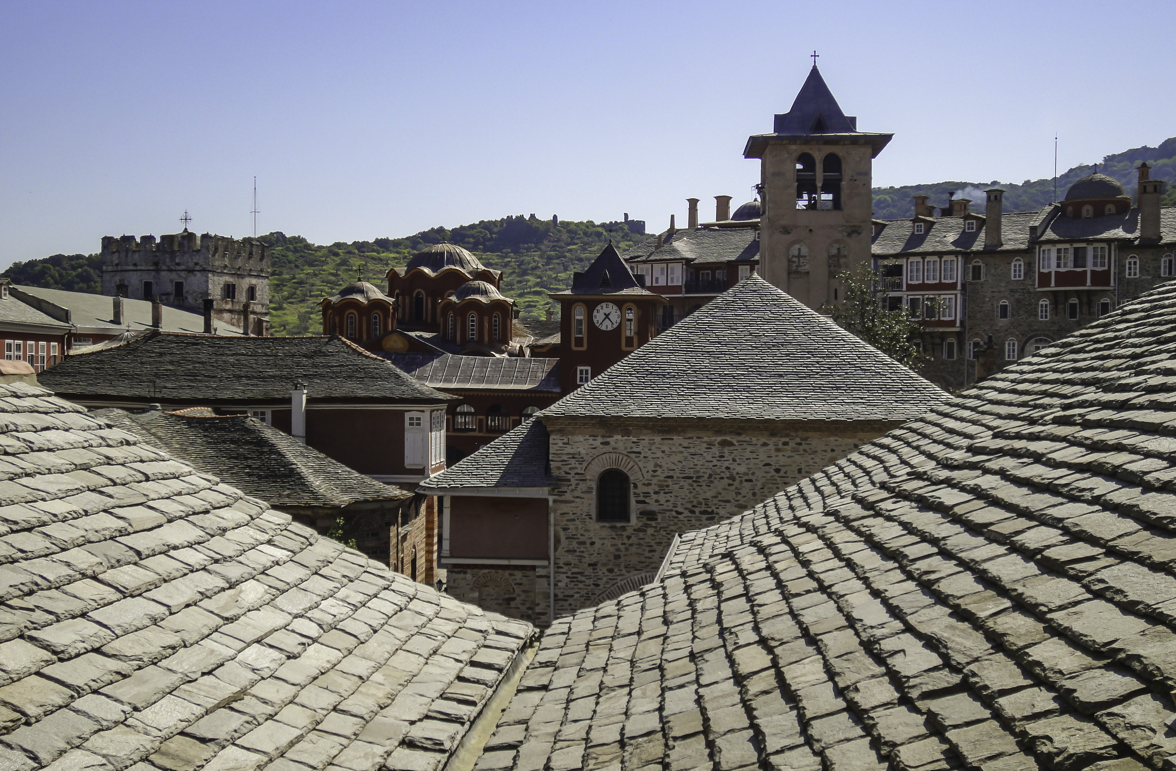 Μονή Βατοπεδίου. Στο βάθος διακρίνεται η Αθωνιάδα Ακαδημία.«Μονή Βατοπεδίου»